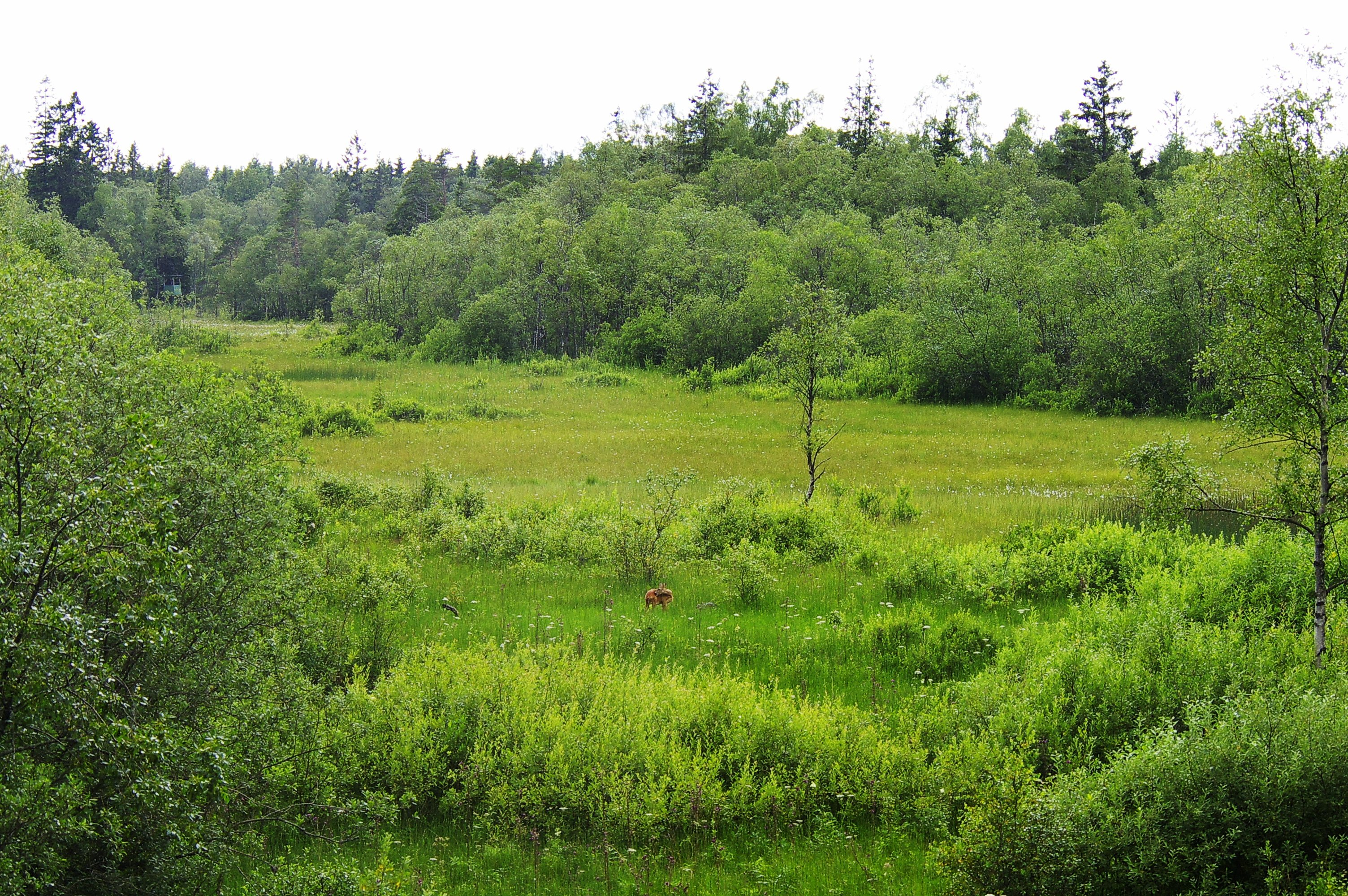 Natura 2000-området Gröna mad på platåberget Mösseberg i Falköpings kommun i Västergötland i Sverige.